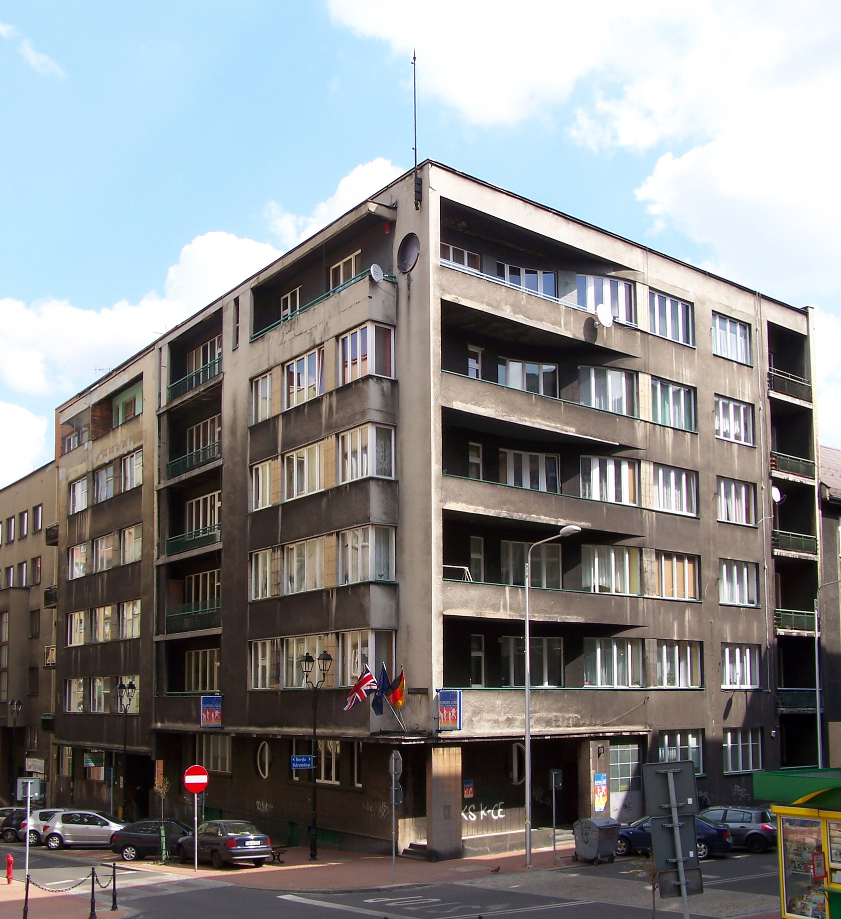 Modernistyczny budynek na rogu ulic Dąbrowskiego i Reymonta w Katowicach (zabytek nr A/289/09)